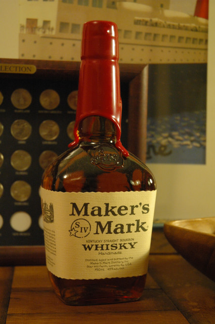 Bouteille de bourbon Maker's Mark. Photo : Arnaud H.